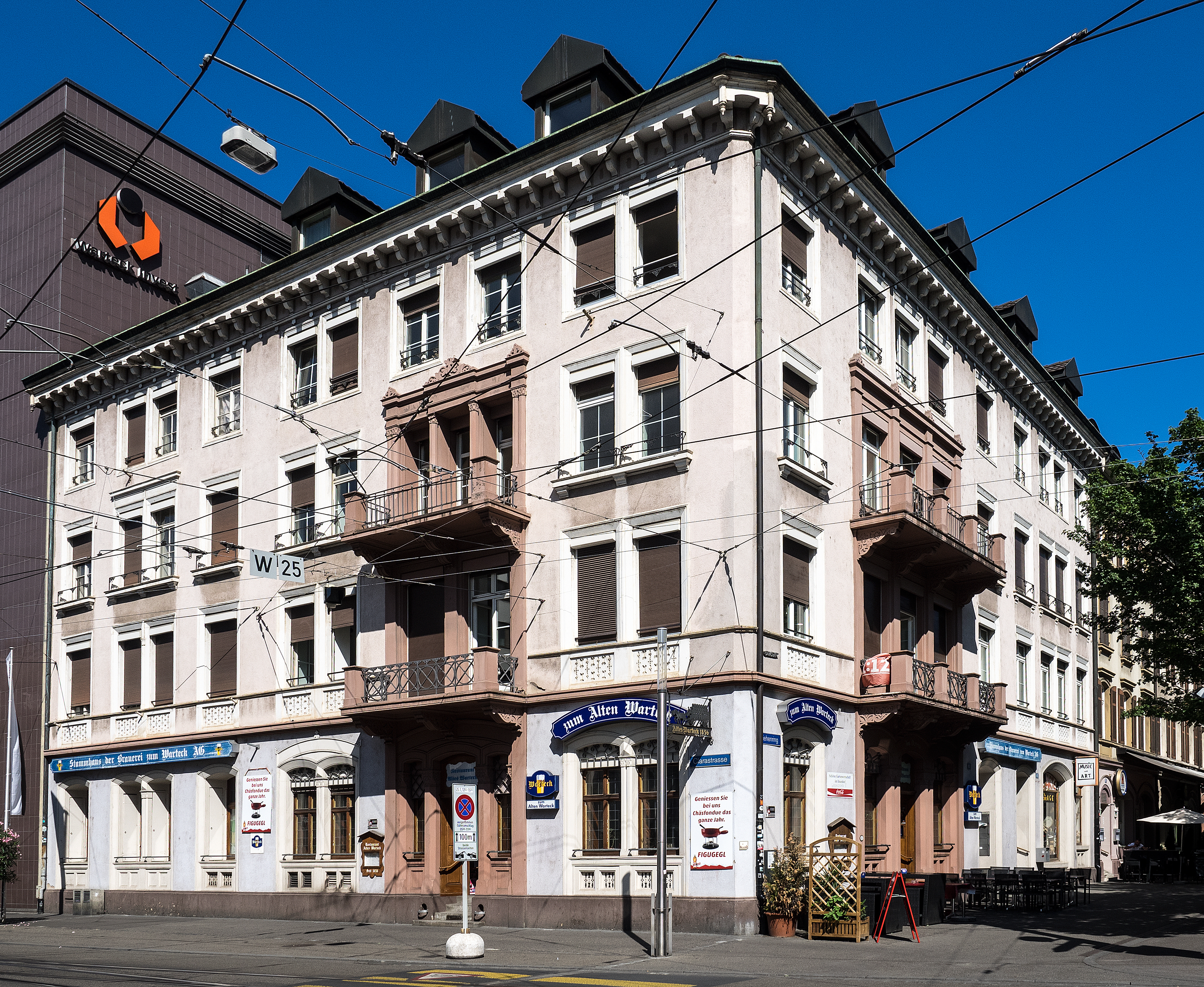 Restaurant zum alten Warteck, Basel.